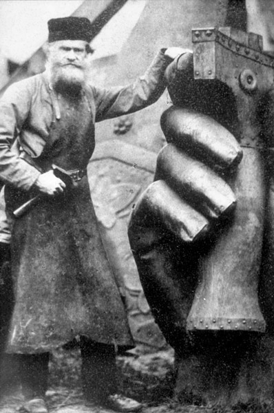 Ernst von Bandel (1800-1876) bei der Arbeit am Hermannsdenkmal, um 1870